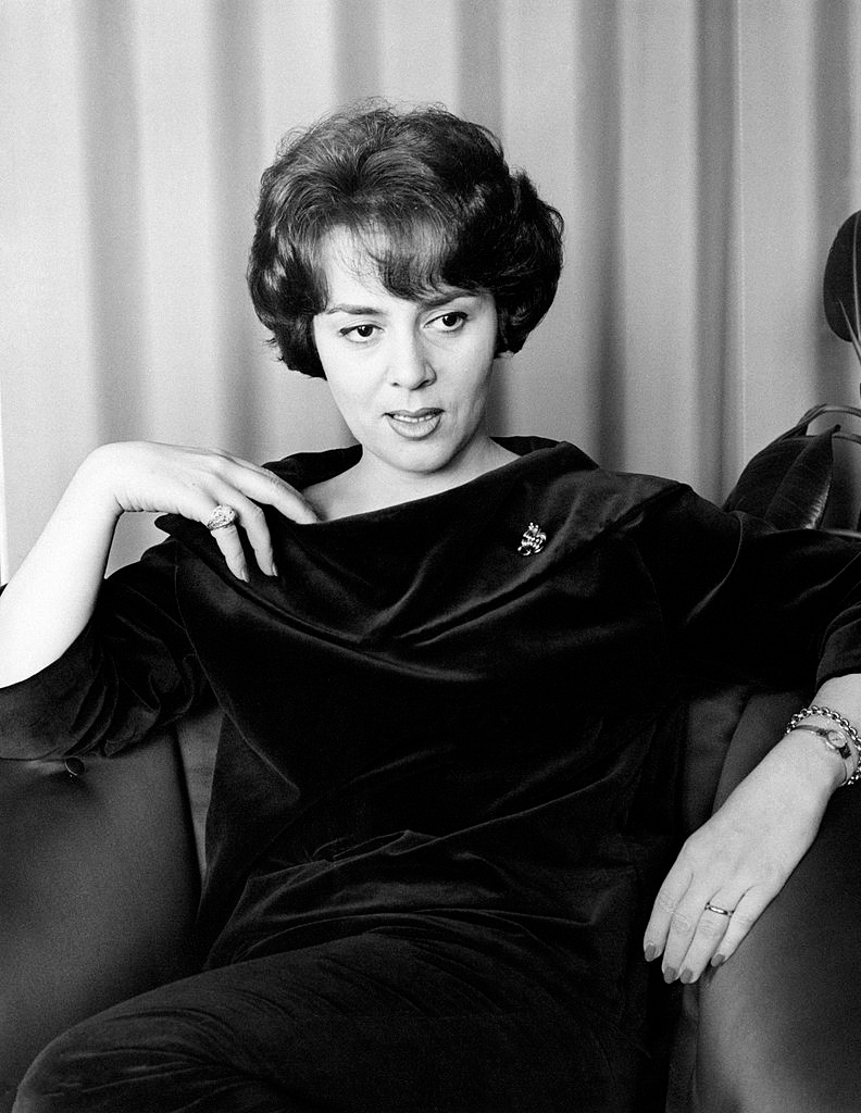 Jula de Palma